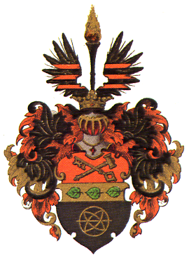 Vaakuna